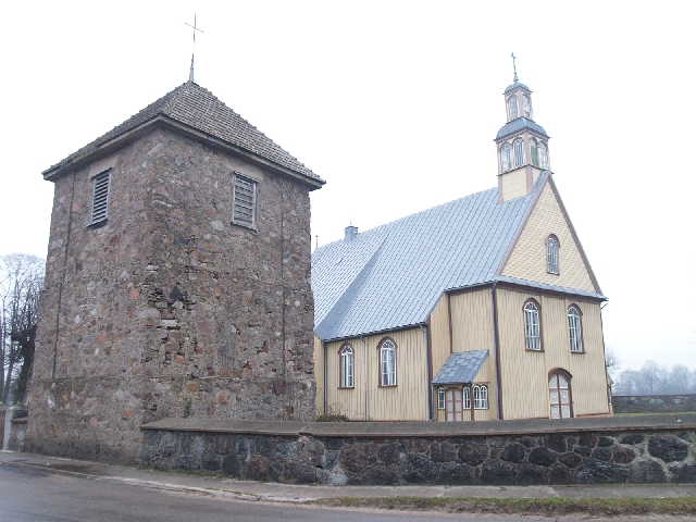 Veiviržėnų bažnyčia ir varpinė